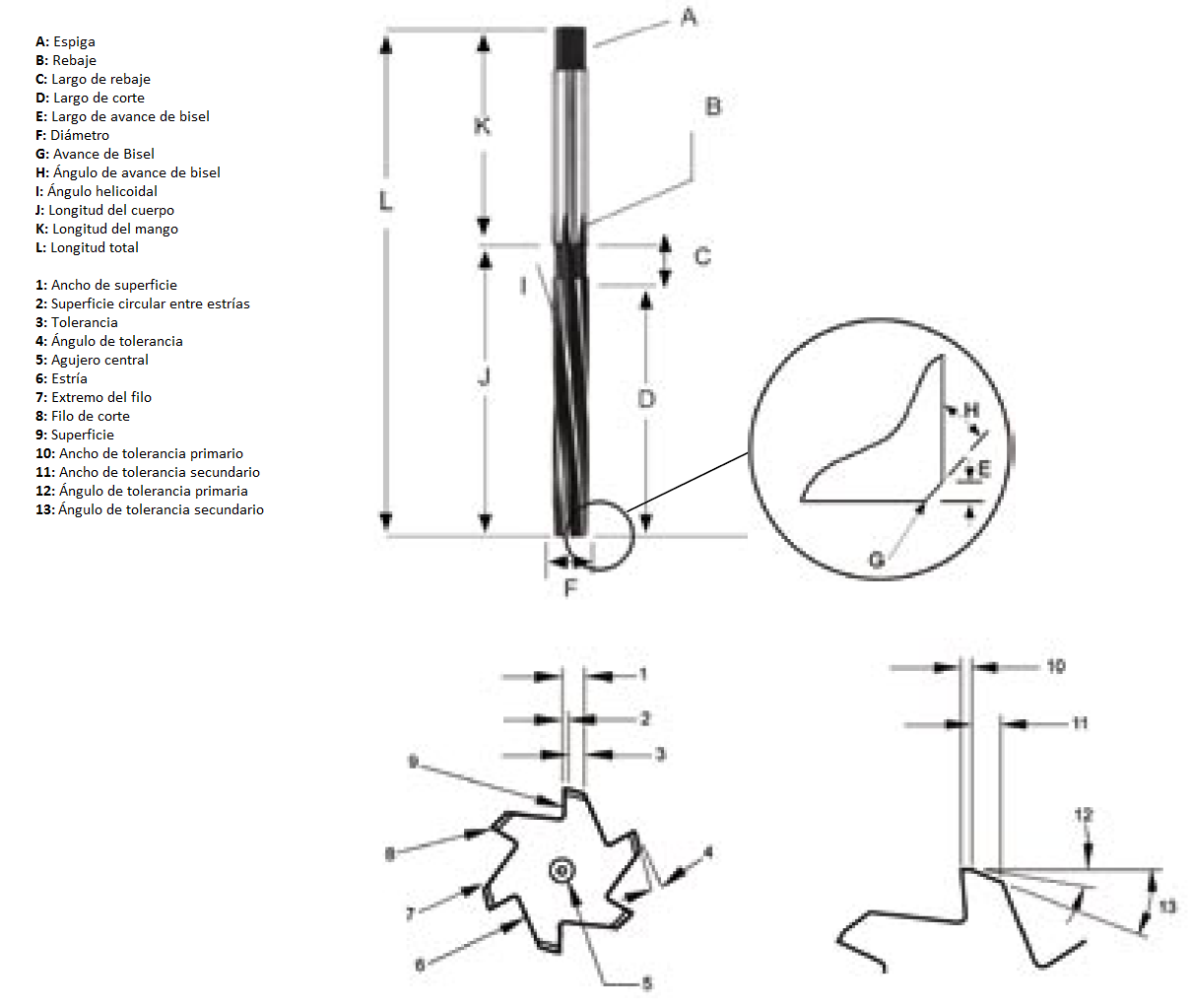 Esquema de las partes de un escariador.